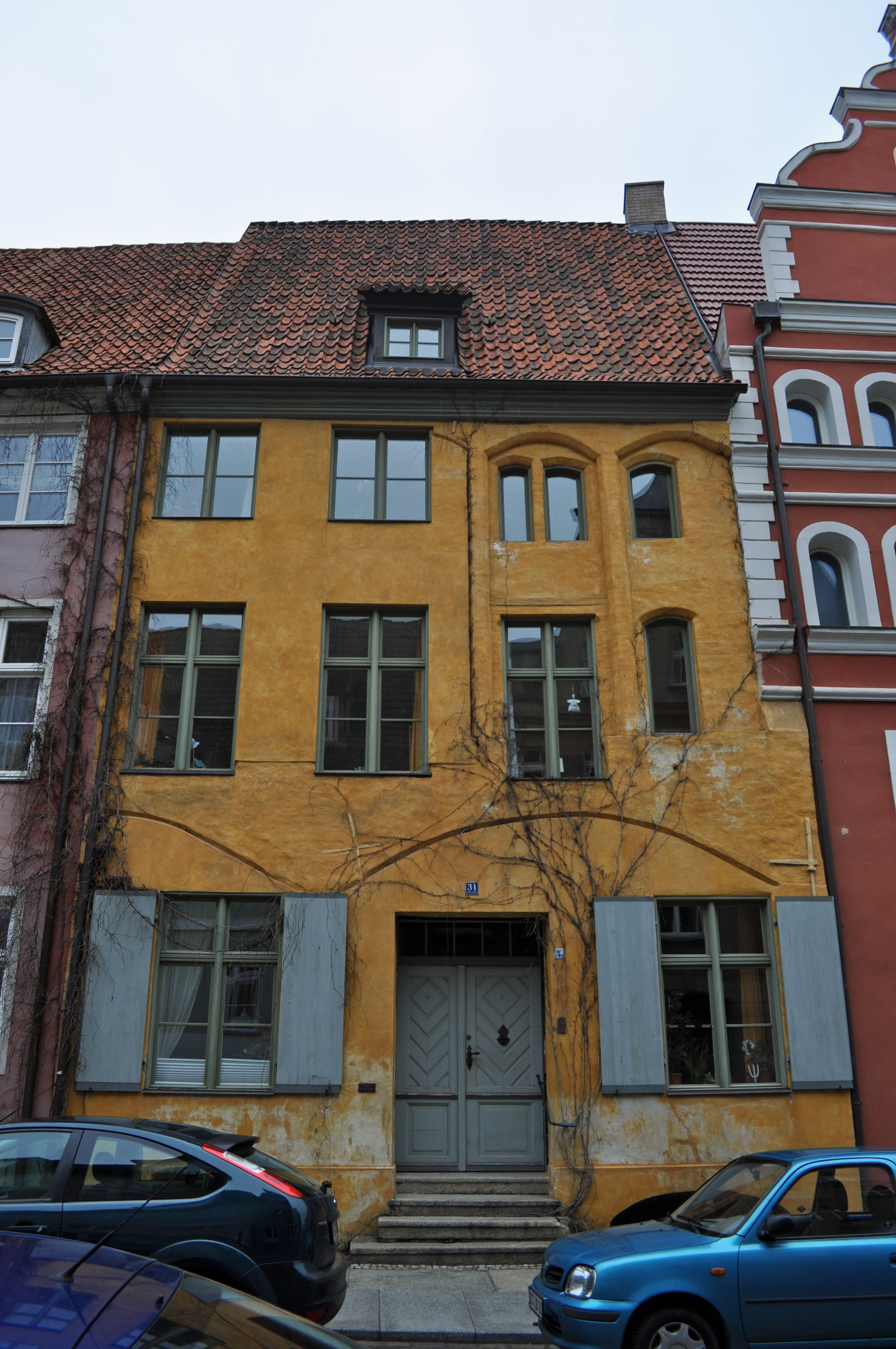 Gebäude bzw. Gebäudedetail in Stralsund. Straße und Hausnummer siehe Dateiname.